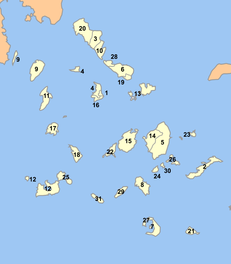 Map of Cyclades prefecture (Greece) with administrative divisions (municipalities and communities) numbered in alphabetical order (in greek). Legend: 1 Δήμος Ερμουπόλεως - Ermoupoli 2 Δήμος Αμοργού - Amorgos 3 Δήμος Άνδρου - Andros 4 Δήμος Άνω Σύρου - Ano Syros 5 Δήμος Δρυμαλίας - Drymalia 6 Δήμος Εξωμβούργου - Exomvourgo 7 Δήμος Θήρας - Thira 8 Δήμος Ιητών - Ios 9 Δήμος Κέας - Kea 10 Δήμος Κορθίου - Korthio 11 Δήμος Κύθνου - Kythnos 12 Δήμος Μήλου - Milos 13 Δήμος Μυκόνου - Mykonos 14 Δήμος Νάξου - Naxos 15 Δήμος Πάρου - Paros 16 Δήμος Ποσειδωνίας - Posidonia 17 Δήμος Σερίφου - Serifos 18 Δήμος Σίφνου - Sifnos 19 Δήμος Τήνου - Tinos 20 Δήμος Υδρούσας - Ydrousa 21 Κοινότητα Ανάφης - Anafi 22 Κοινότητα Αντιπάρου - Andiparos 23 Κοινότητα Δονούσης - Donousa 24 Κοινότητα Ηρακλείας - Iraklia 25 Κοινότητα Κιμώλου - Kimolos 26 Κοινότητα Κουφονησίων - Koufonisi 27 Κοινότητα Οίας - Ia 28 Κοινότητα Πανόρμου - Panormos 29 Κοινότητα Σικίνου - Sikinos 30 Κοινότητα Σχοινούσσης - Schinoussa 31 Κοινότητα Φολεγάνδρου - Folegandros